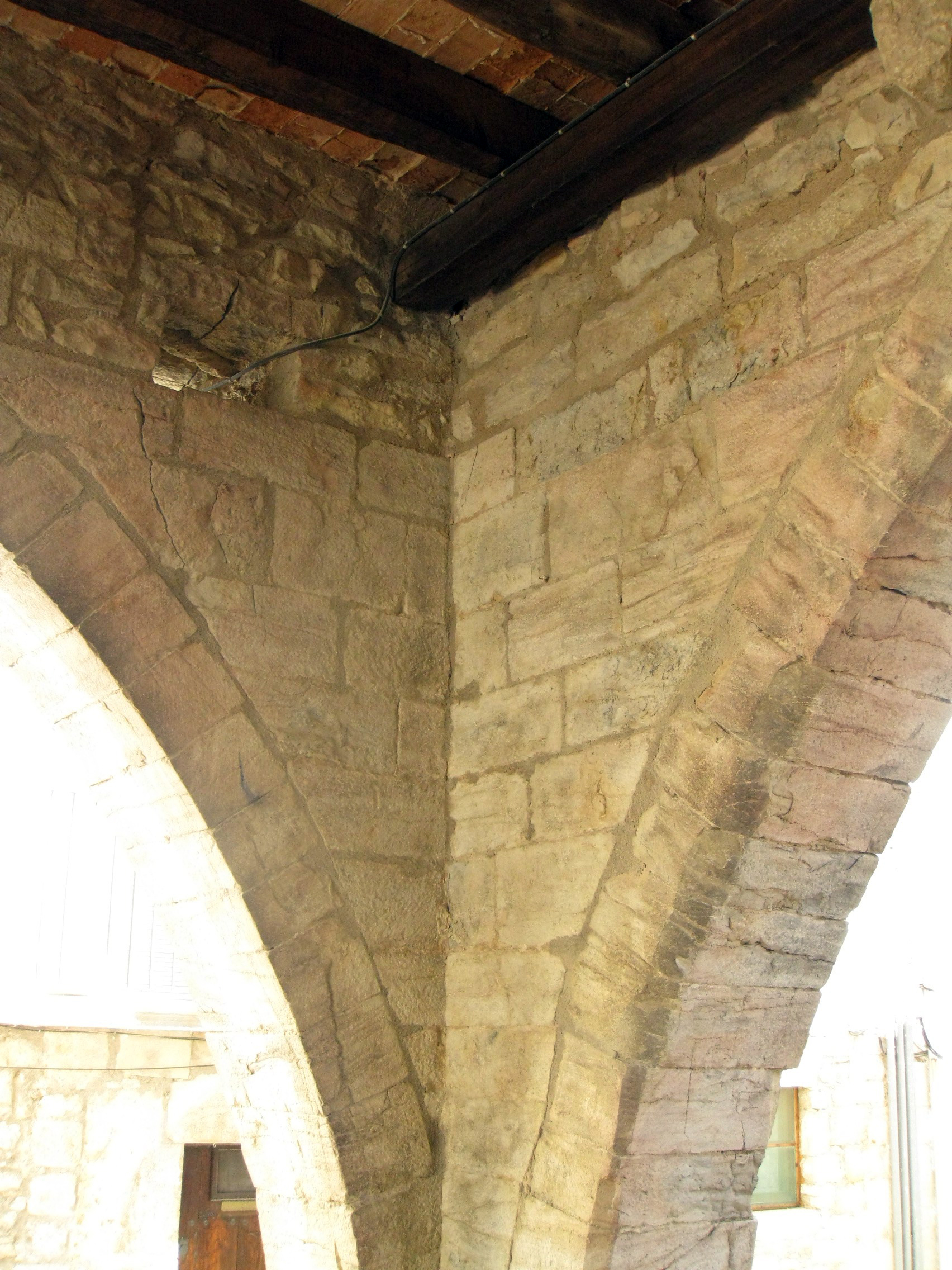 Antiga llotja (Ares del Maestrat) 02.014-017.